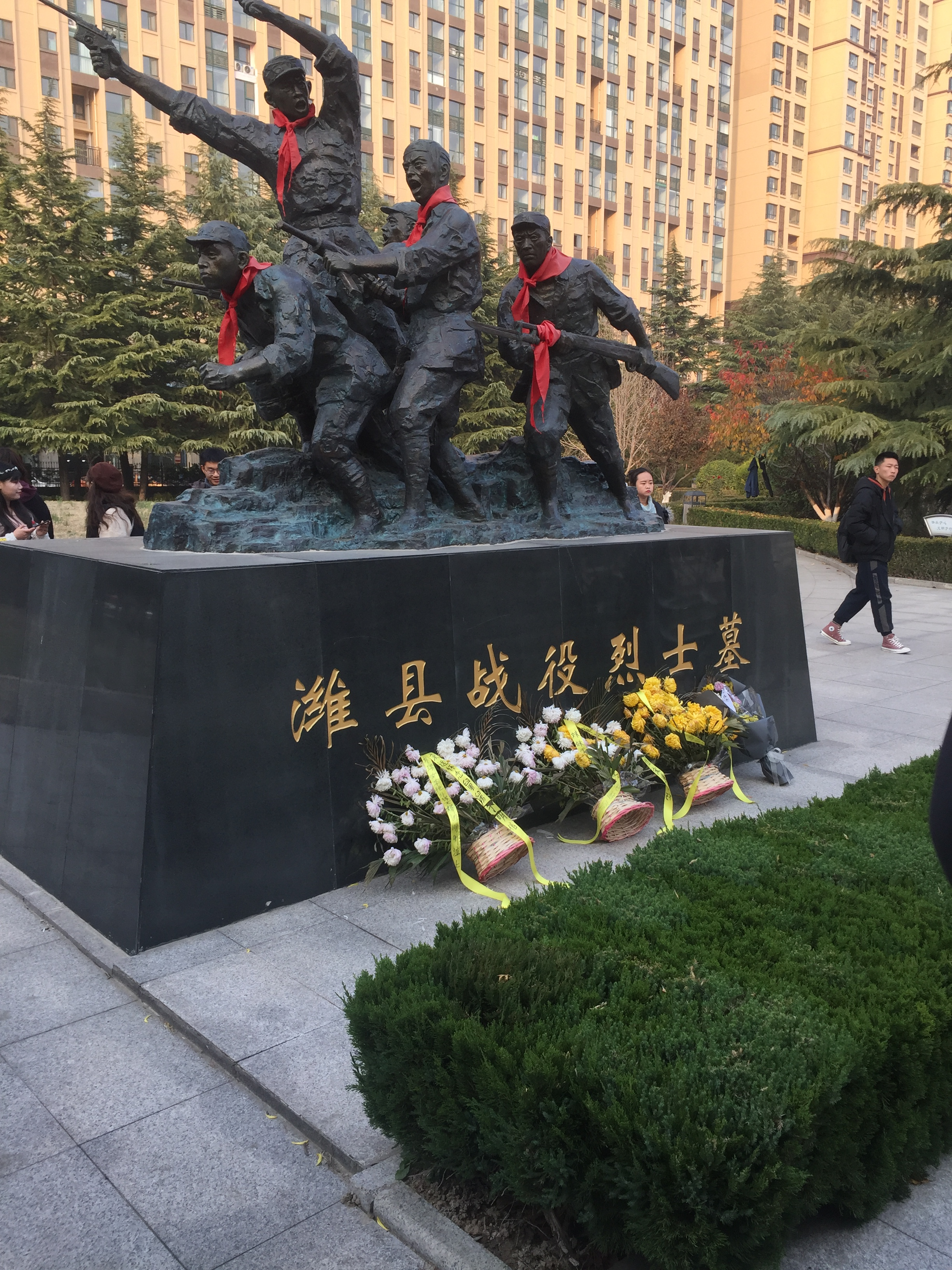 中文（中国大陆）: 潍坊烈士陵园